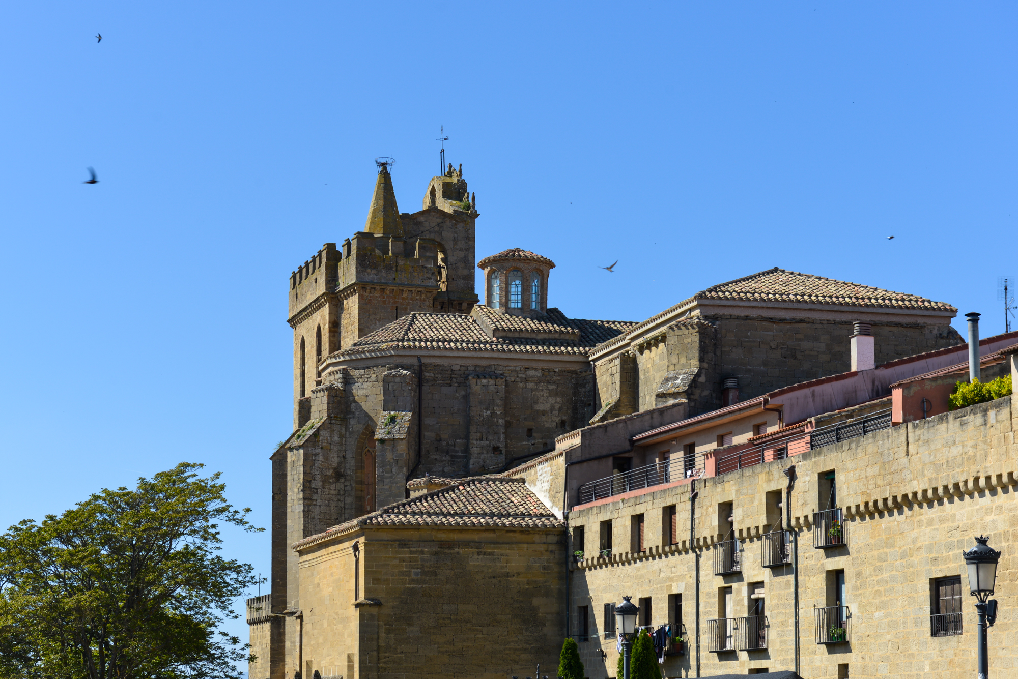 Guardia